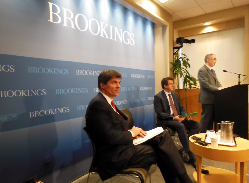 (Soldan Sağa) Jose Fernandez, Nihat Zeybekci ve Kemal Kirişci Brookings Enstitüsü'nde.